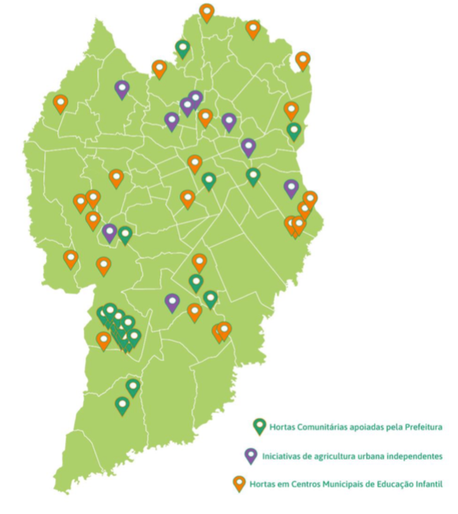 Mapa com cerca de 60 hortas encontradas na cidade de Curitiba em julho de 2019.